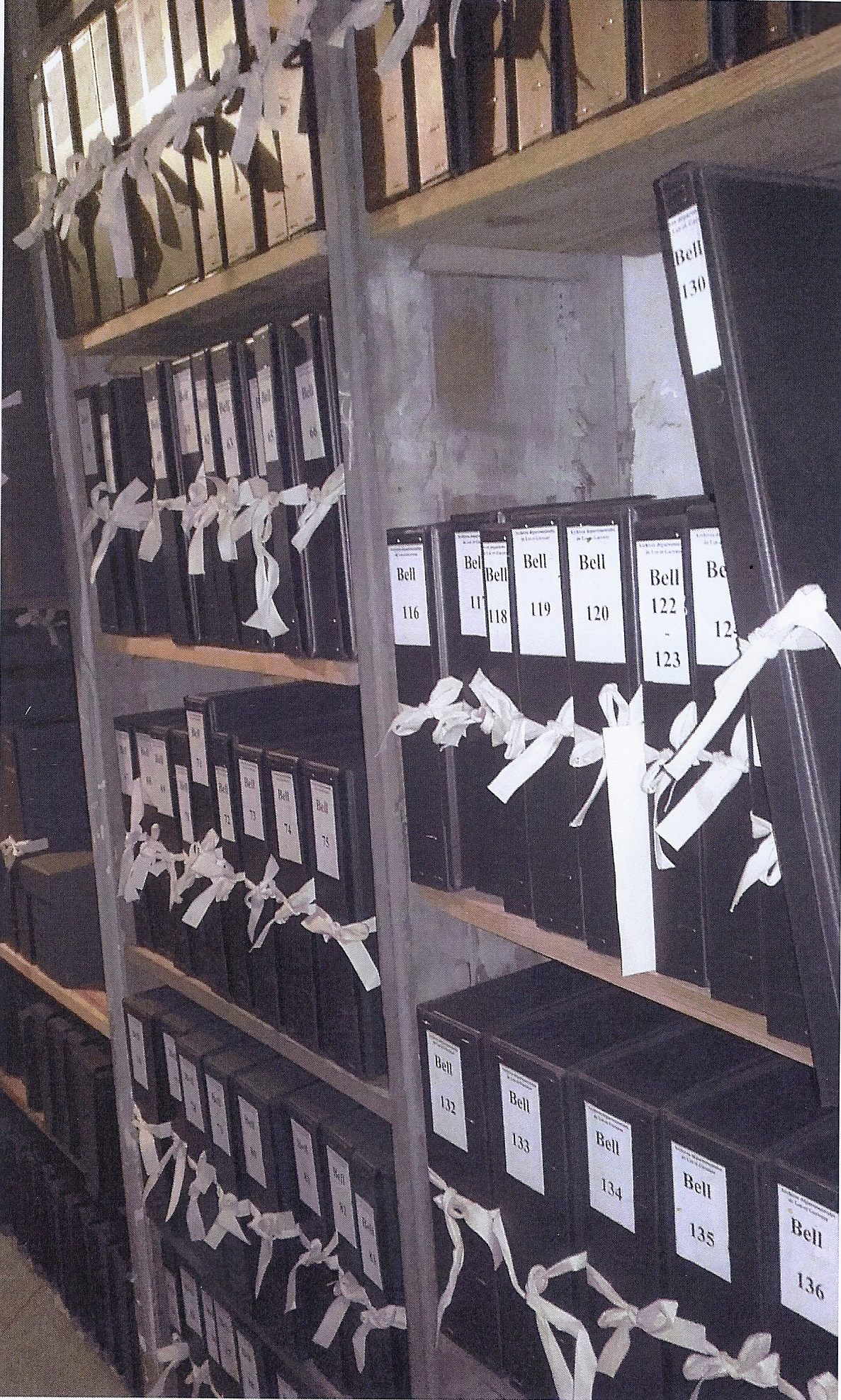 Ses oeuvres à la bibliothèque d'Agen